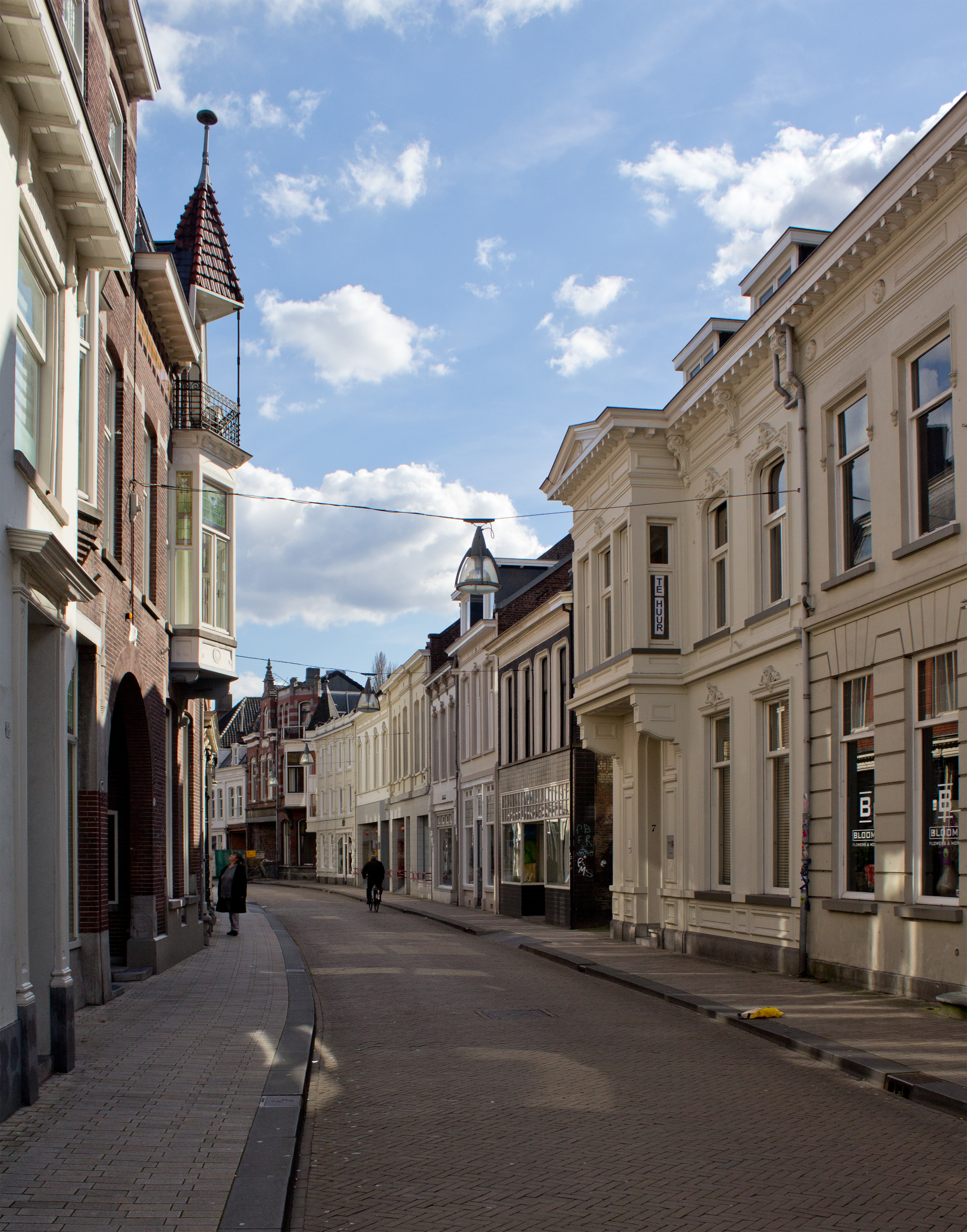 Een impressie van de Nieuwlandstraat te Tilburg. Is het verlengde van de Stationsstraat. Onderdeel van het beschermd stadsgezicht Stadskern Tilburg.